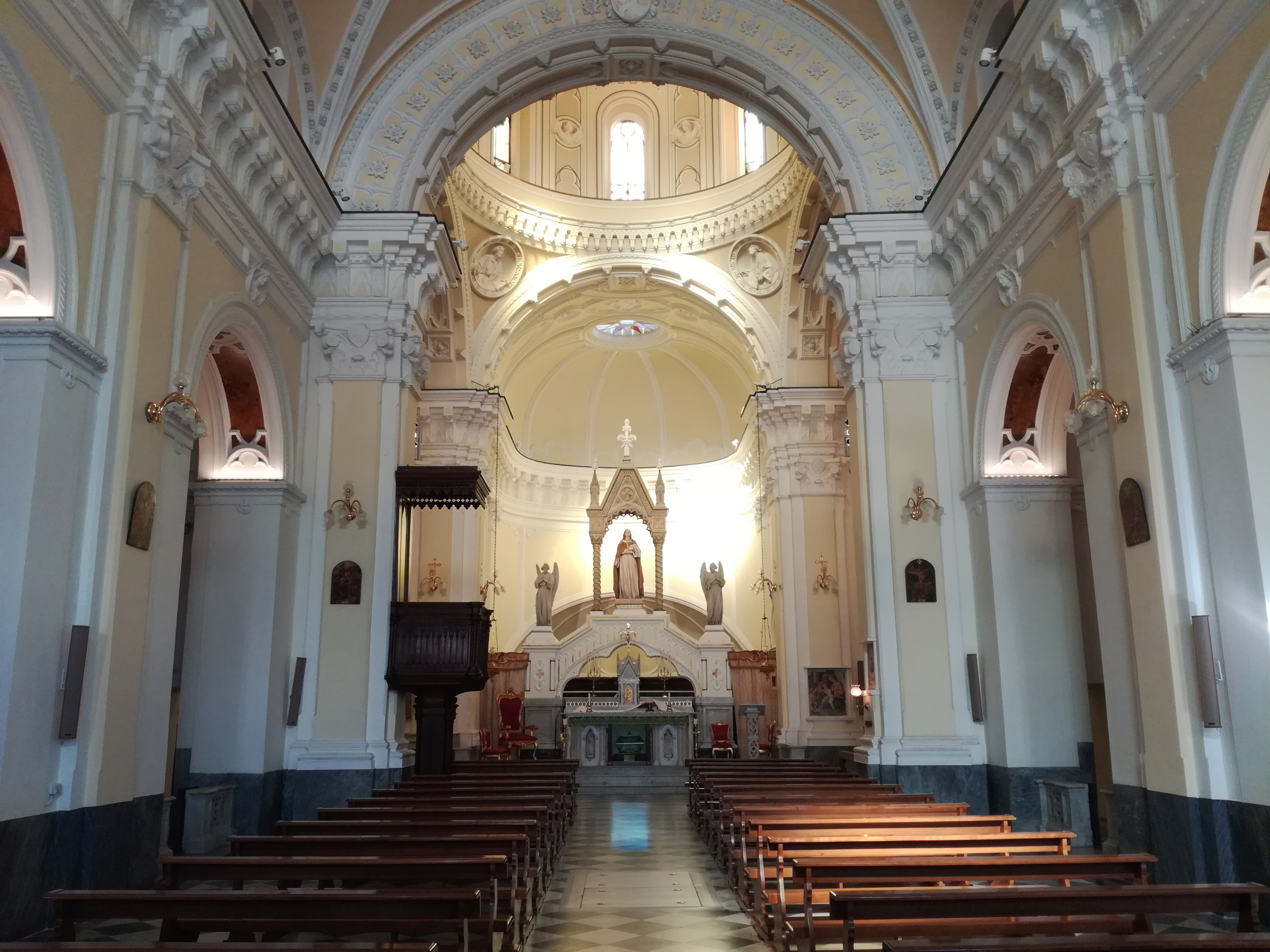 Interno della chiesa di Santa Lucia al Monte (Napoli)